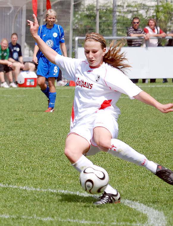 Julia Zirnstein beim Bundesligaspiel SC Freiburg vs. VfL Wolfsburg am 20.05.2007 (Endstand 4:0)